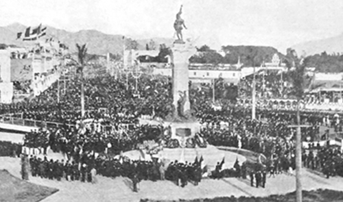 Inauguración del monumento de Francisco Bolognesi (Revista Actualidades, N°138. Lima, 18 de noviembre de 1905)